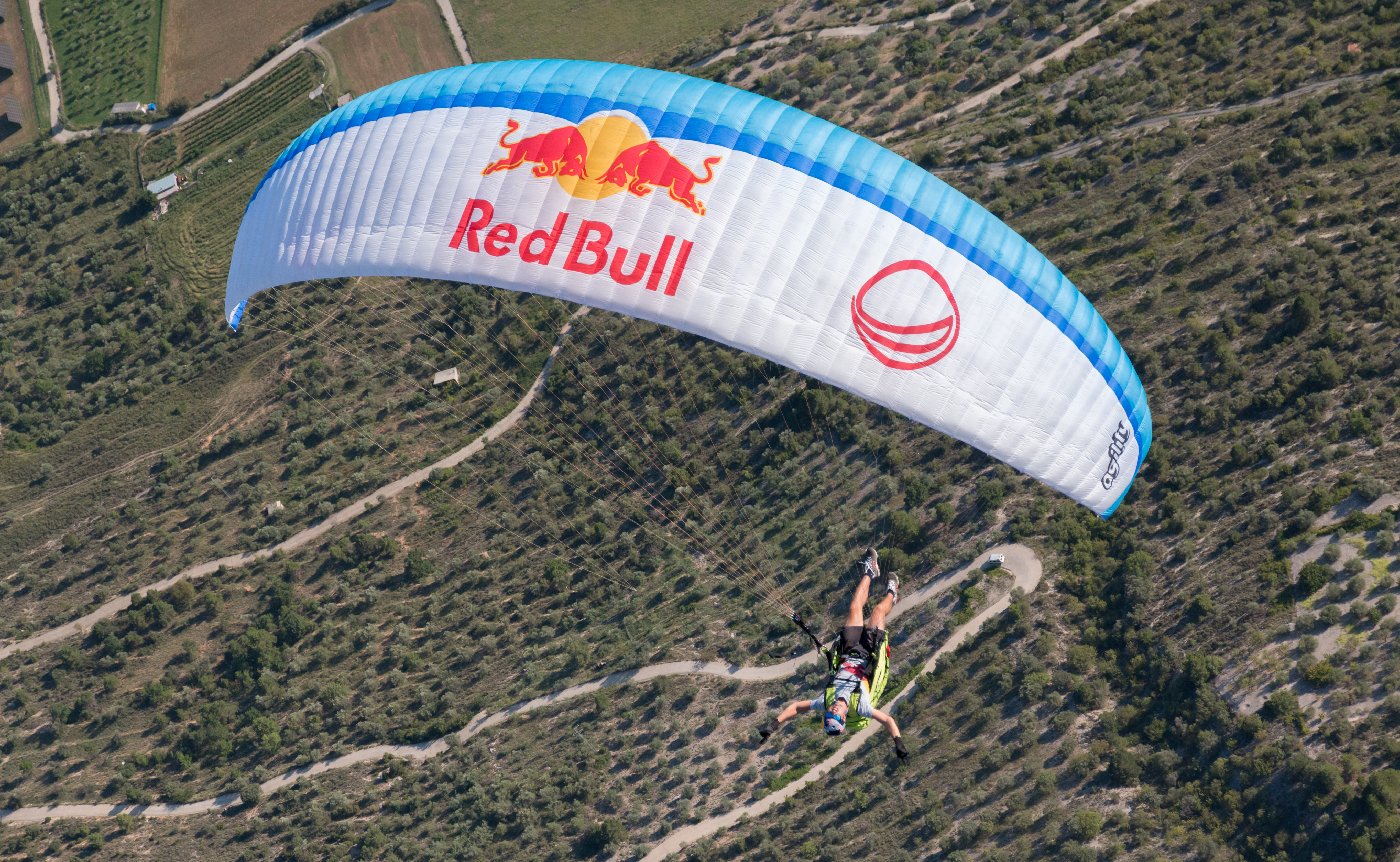 Horacio Llorens